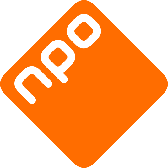 Logo van de Nederlandse Publieke Omroep